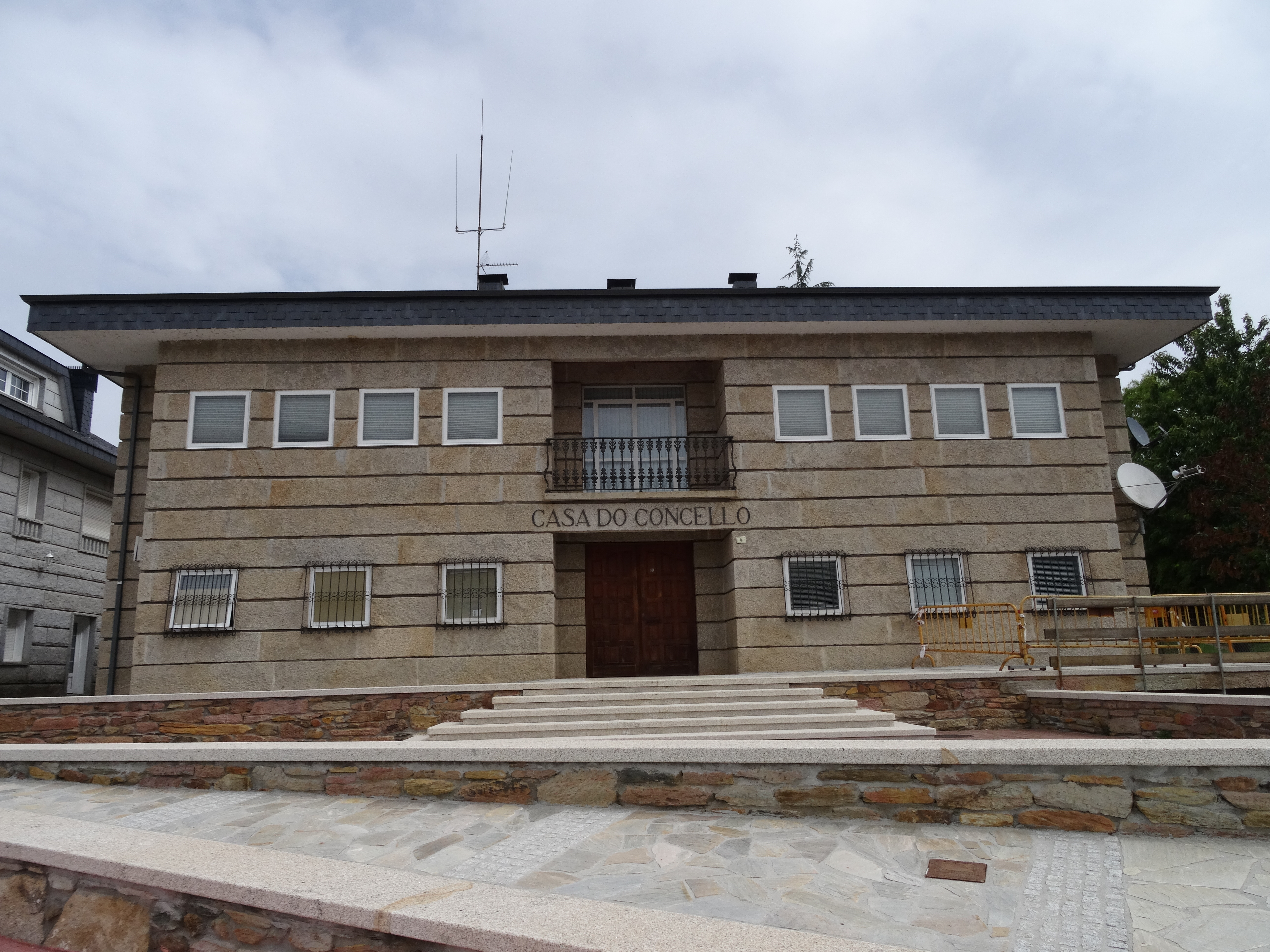 Ver o título.